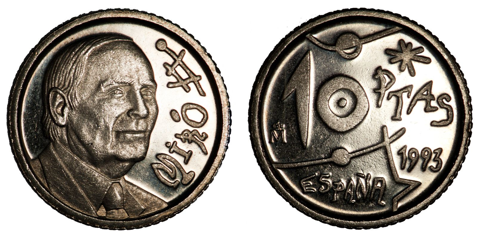 10 Pesetas 1993